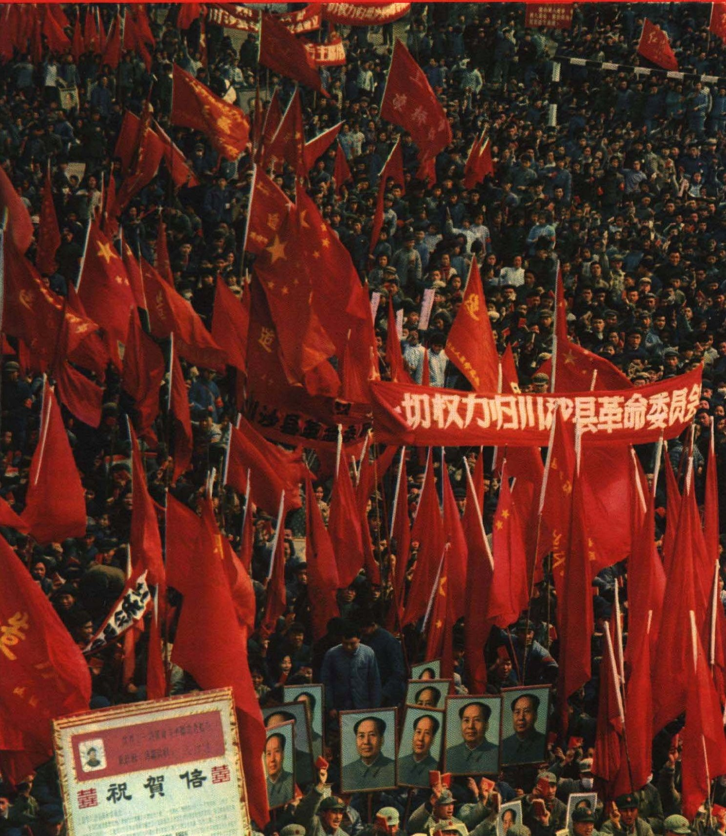 1967-05 上海川沙县革命委员会成立